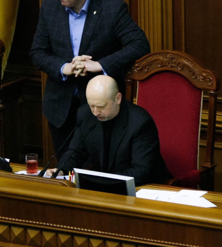 In Parliament